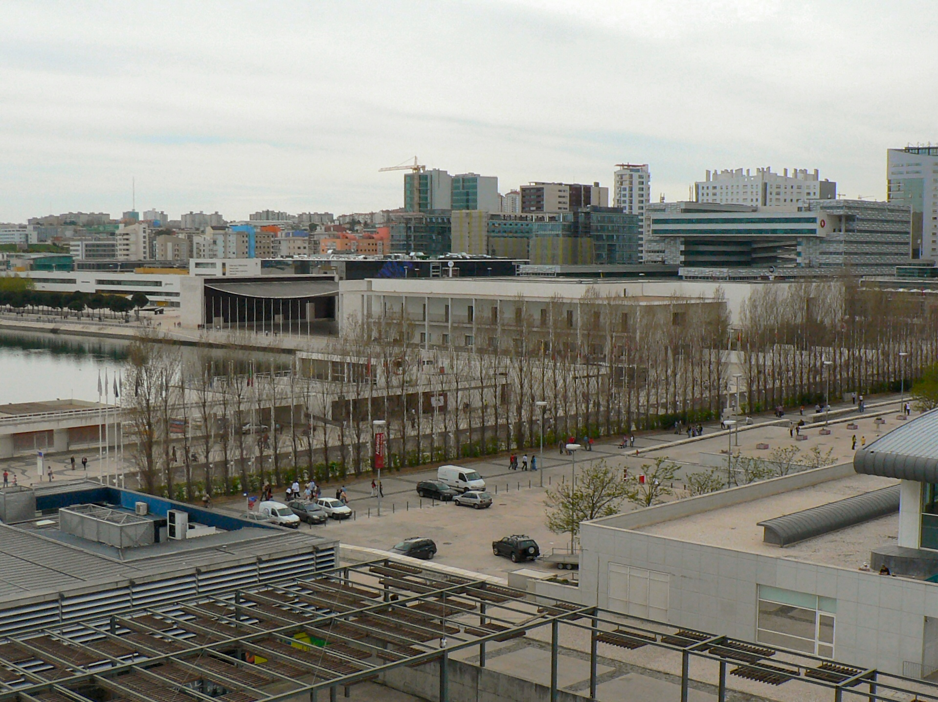 Pavilhão de Portugal no Parque das Nações em Lisboa (Vista do teleférico)